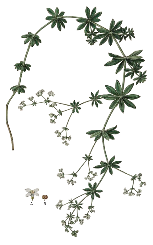 Illustration of Asperula rivalis [= Galium rivale]